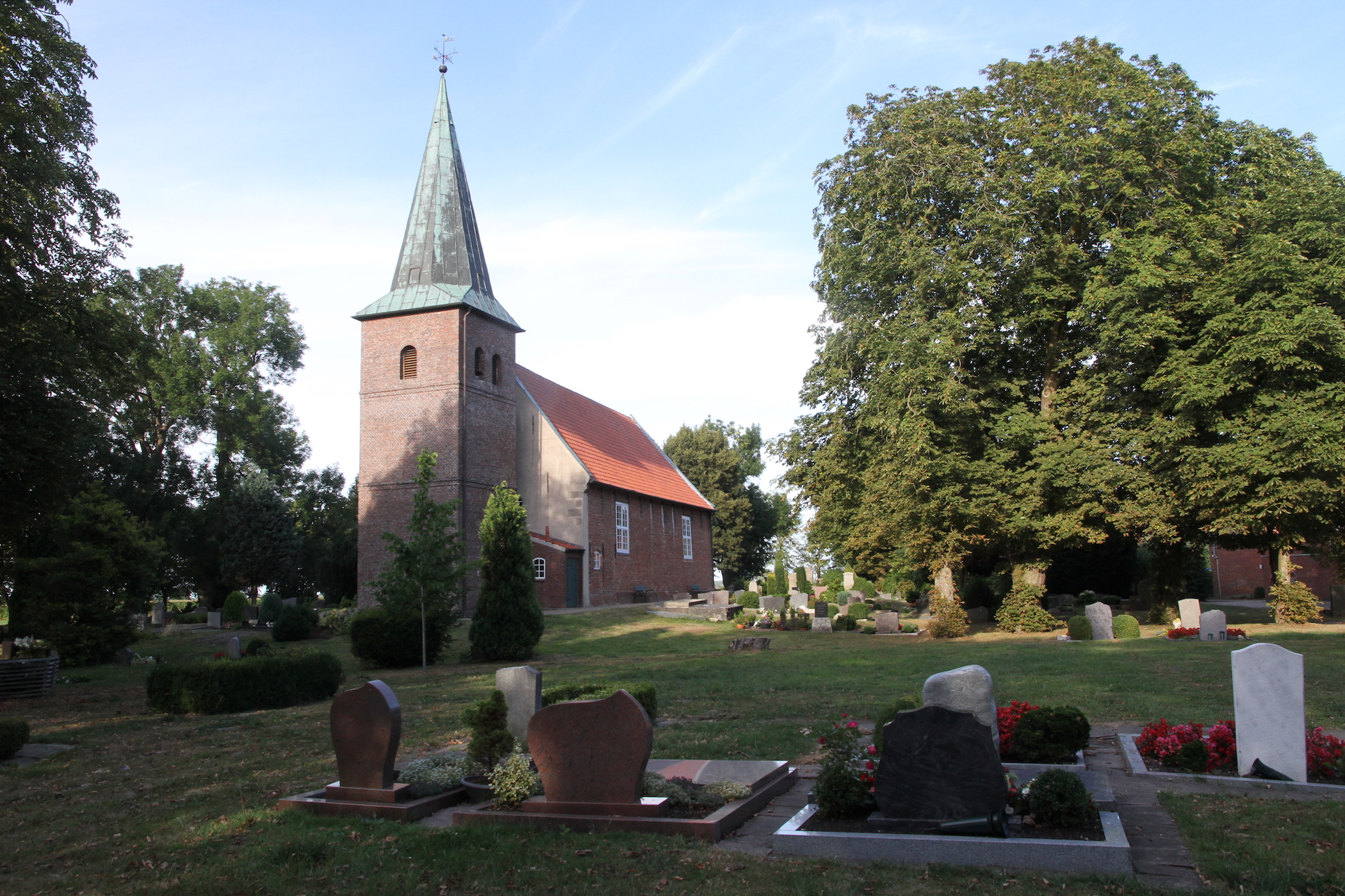 1762 entstandenes Kirchgebäude in Schweiburg (Jade), 2012 "St. Vitus" getauft.